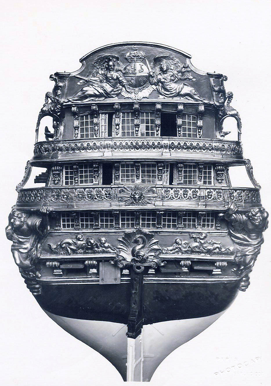 Stern of Dauphin Royal, access number 11 MG 2. Photographie de la maquette du navire réalisé en 1751 pour l'éducation du Dauphin. Modèle réduit du Musée de Rochefort, sans rapport avec le Dauphin Royal construit en 1668. Photograph of the model of the ship made ​​in 1751. Museum of Rochefort, unrelated Dauphin Royal ship built in 1668.